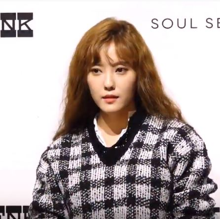 차예련, 소유와 효민이 17일 오후 서울시 강남구 청담동 분더샵에서 열린 한 브랜드의 포토행사에 참석했다.